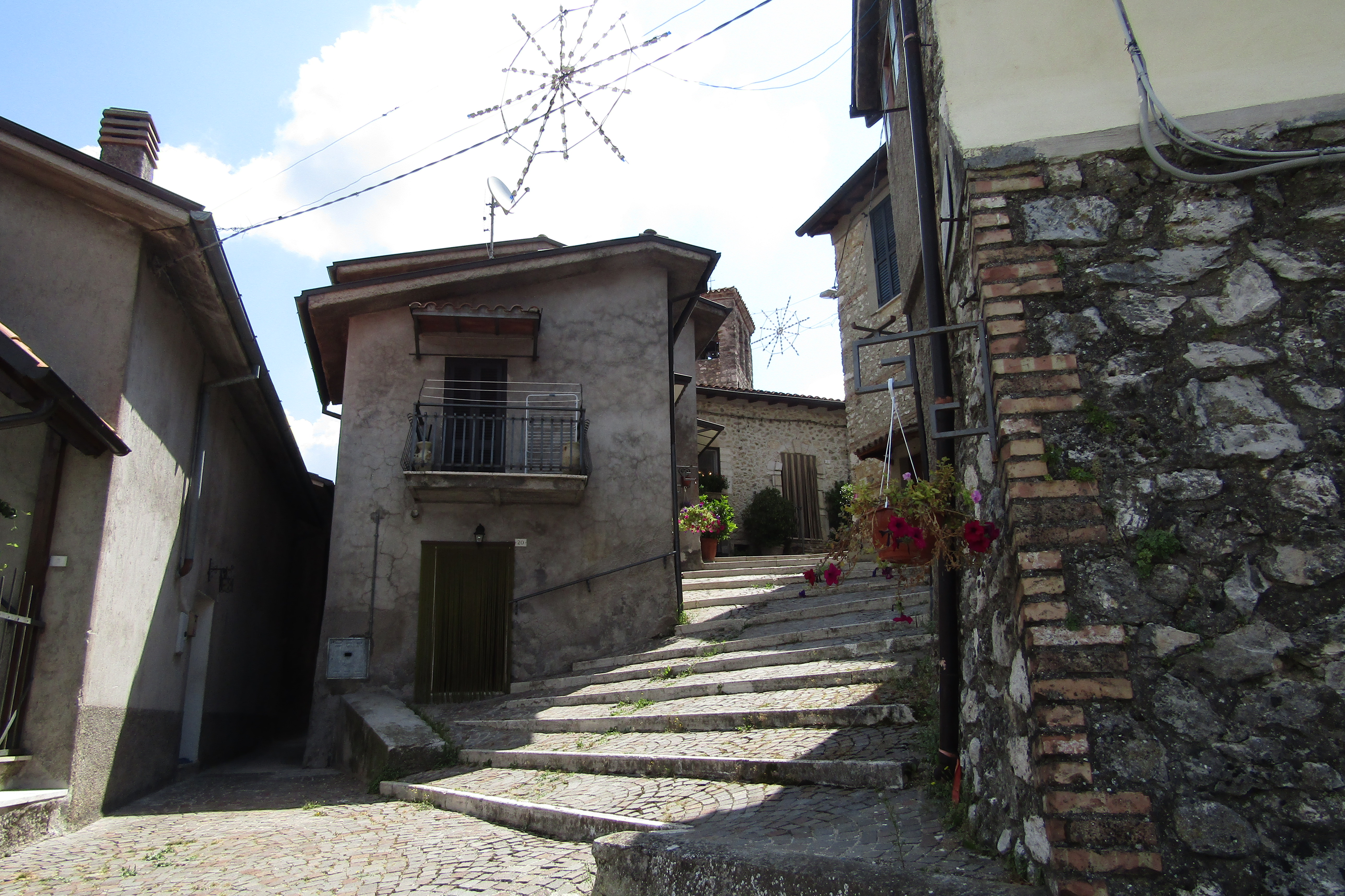 Capoterra